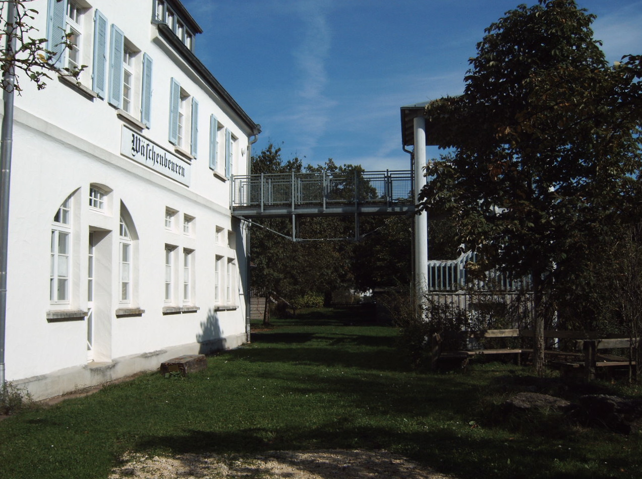 Bahnhofsgebäude Wäschenbeuren der ehemaligen Hohenstaufenbahn